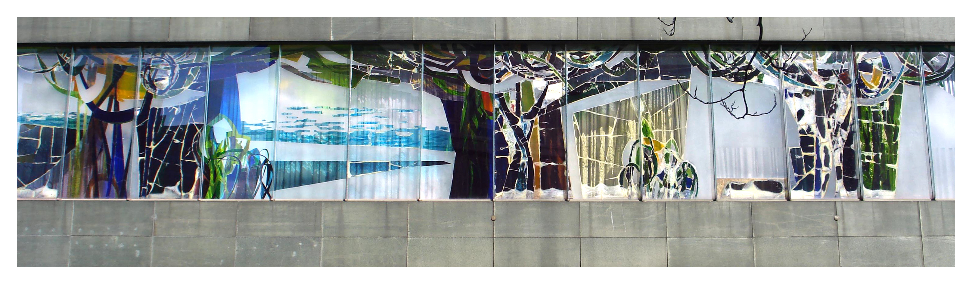 Rotterdam, Kruiskade. Glaswerk Hilton hotel van J.P. van den Broek en Lydia Luyten. Rotterdam/The Netherlands. Glaswerk met titel Le Jardin uit 1963. Lengte 32 meter en bestaat uit 19 glaspanelen van gekleurd glas. Afgebeeld zijn plantmotieven en guirlandes. Binnenzijde bevindt zich de Jardinzaal. Bron Beeldende kunst en openbare ruimte Rotterdam